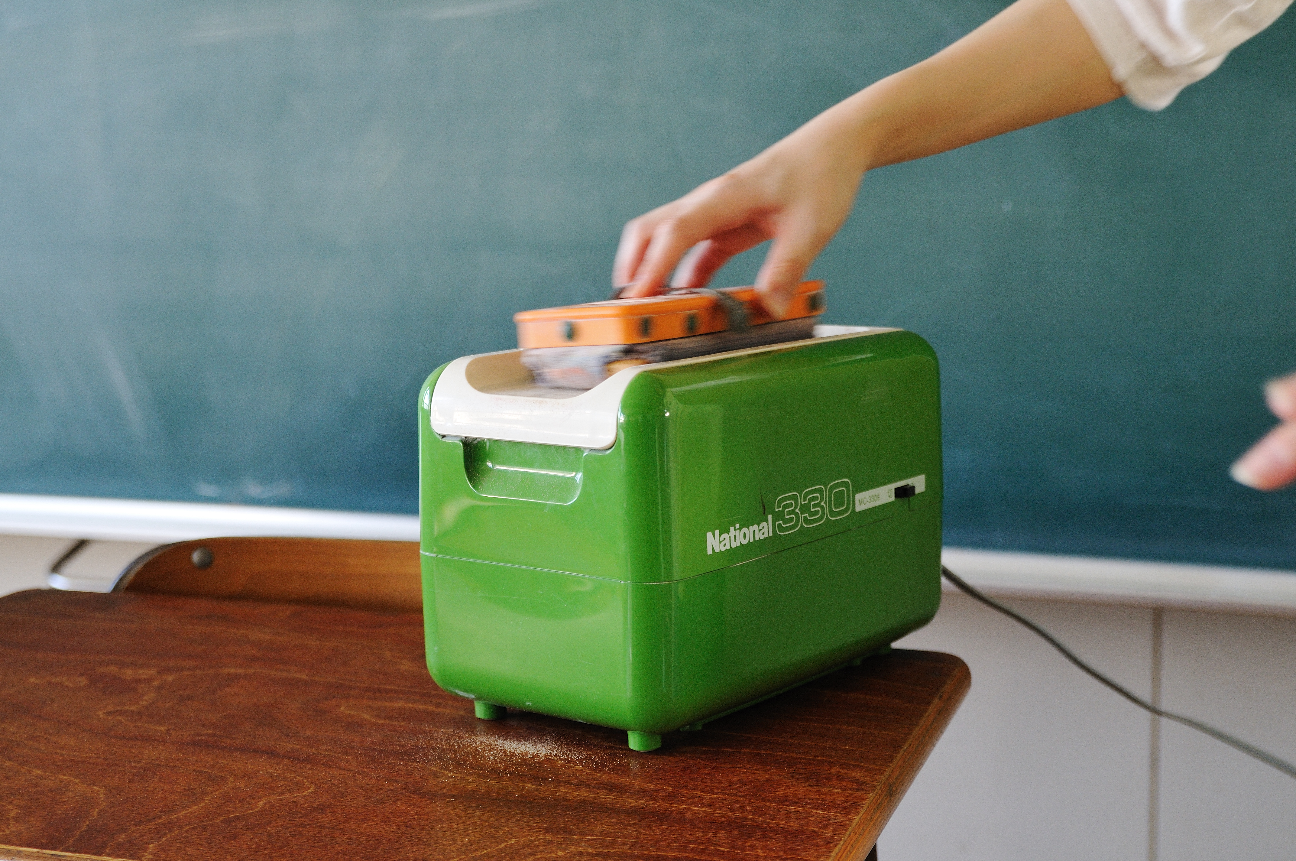 Heiwa elementary school 平和小学校 _27